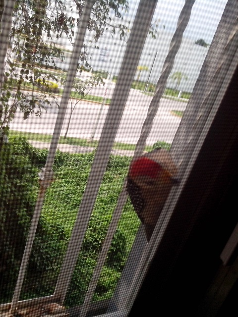 Carpintero Cabeza Roja en Poza Rica, Veracruz, México